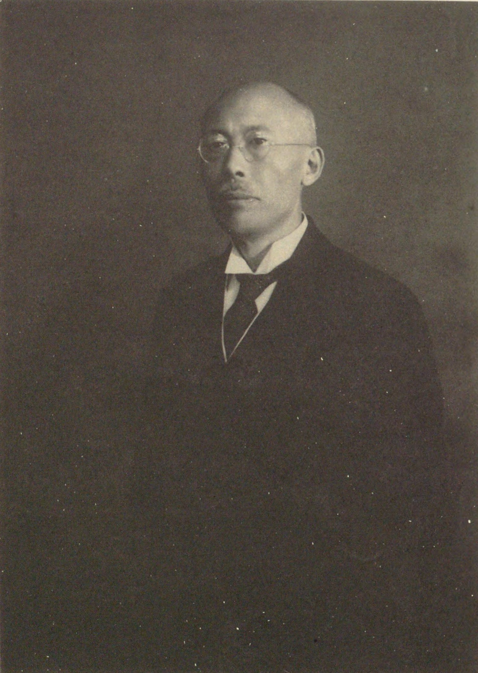 六代目鈴木與平（1883～1940）